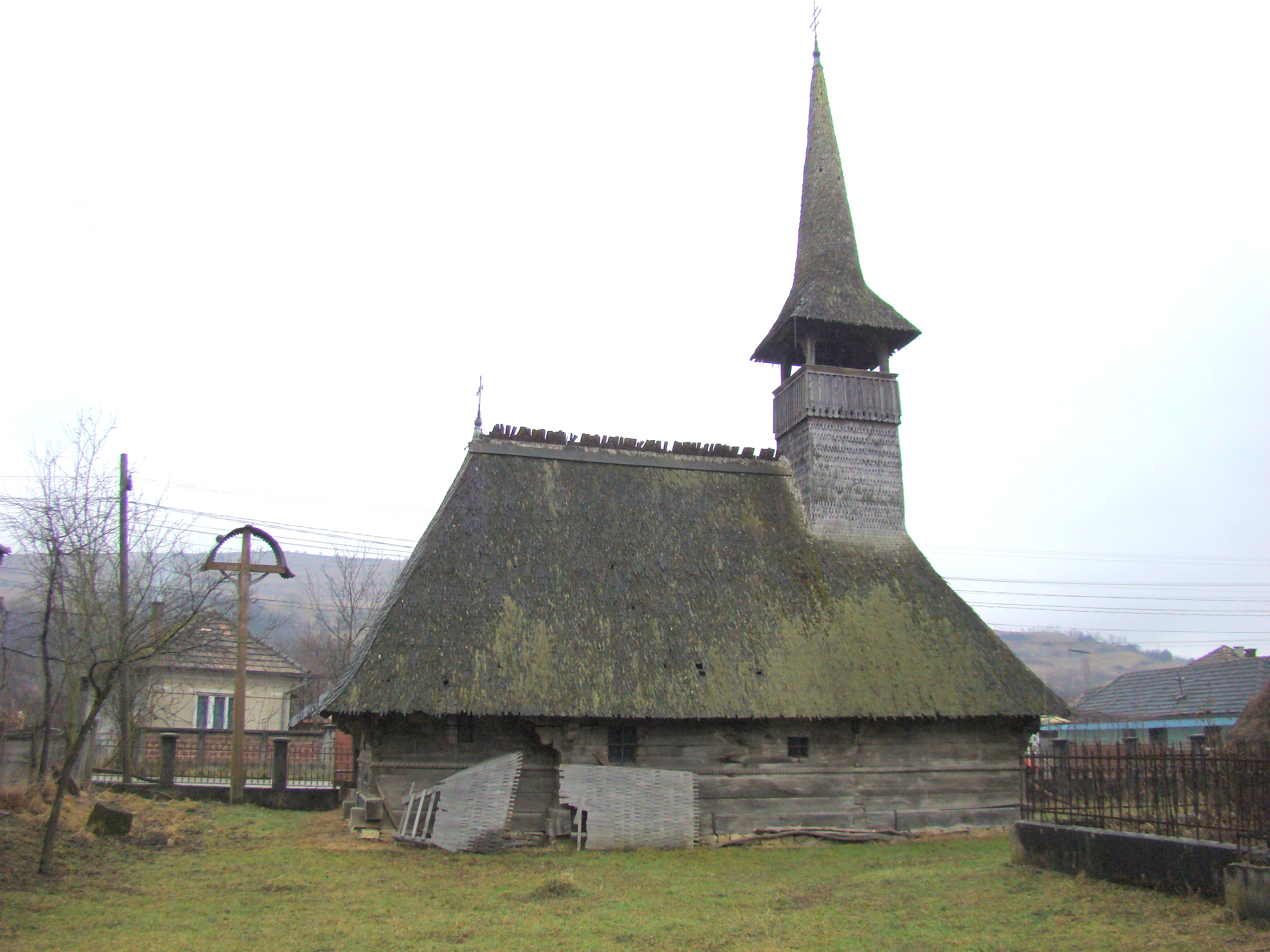 Biserica de lemn „Sf.Apostoli Petru și Pavel”,Sâmpetru Almașului, Sălaj